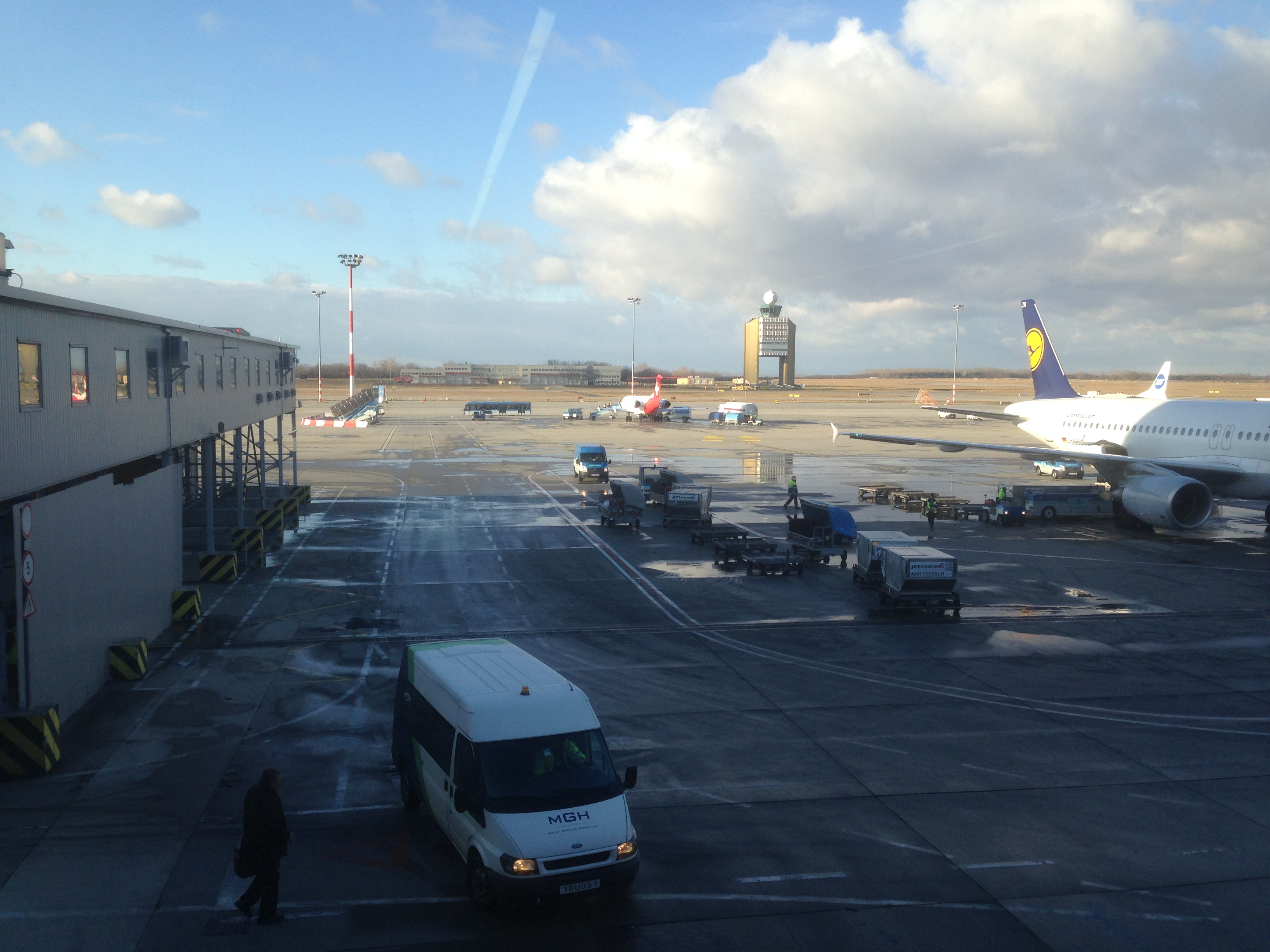 Fra terminal 2A